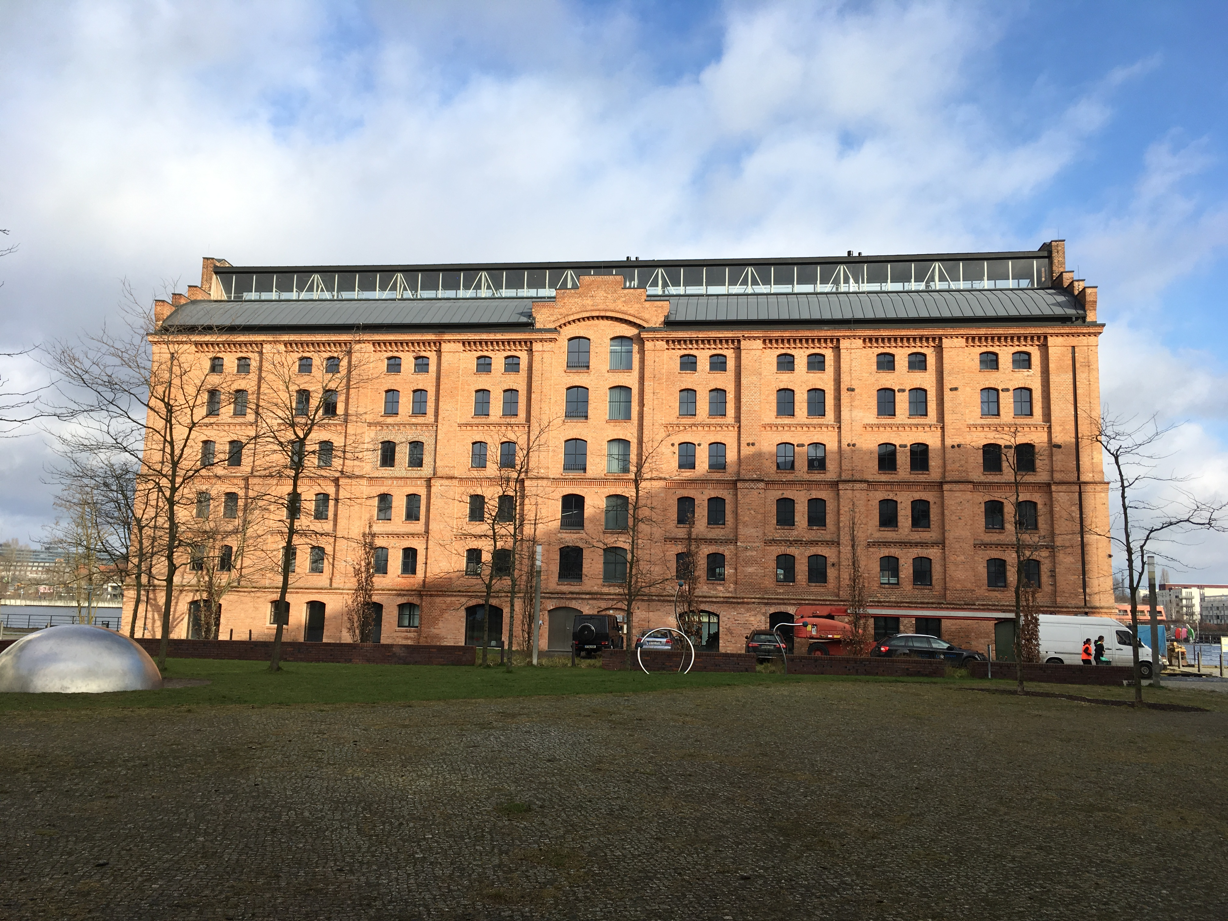 Historischer Palmkernölspeicher in Berlin-Stralau